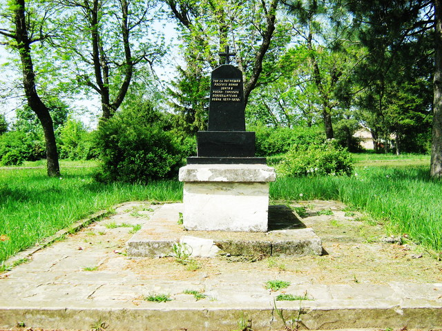 Руският паметник, поставен в северните покрайнини на град Попово и посветен на загинали руски войници през лятото на 1877 год. в боевете при село Аязлар (дн. Светлен). Фото: Вл. Стойков